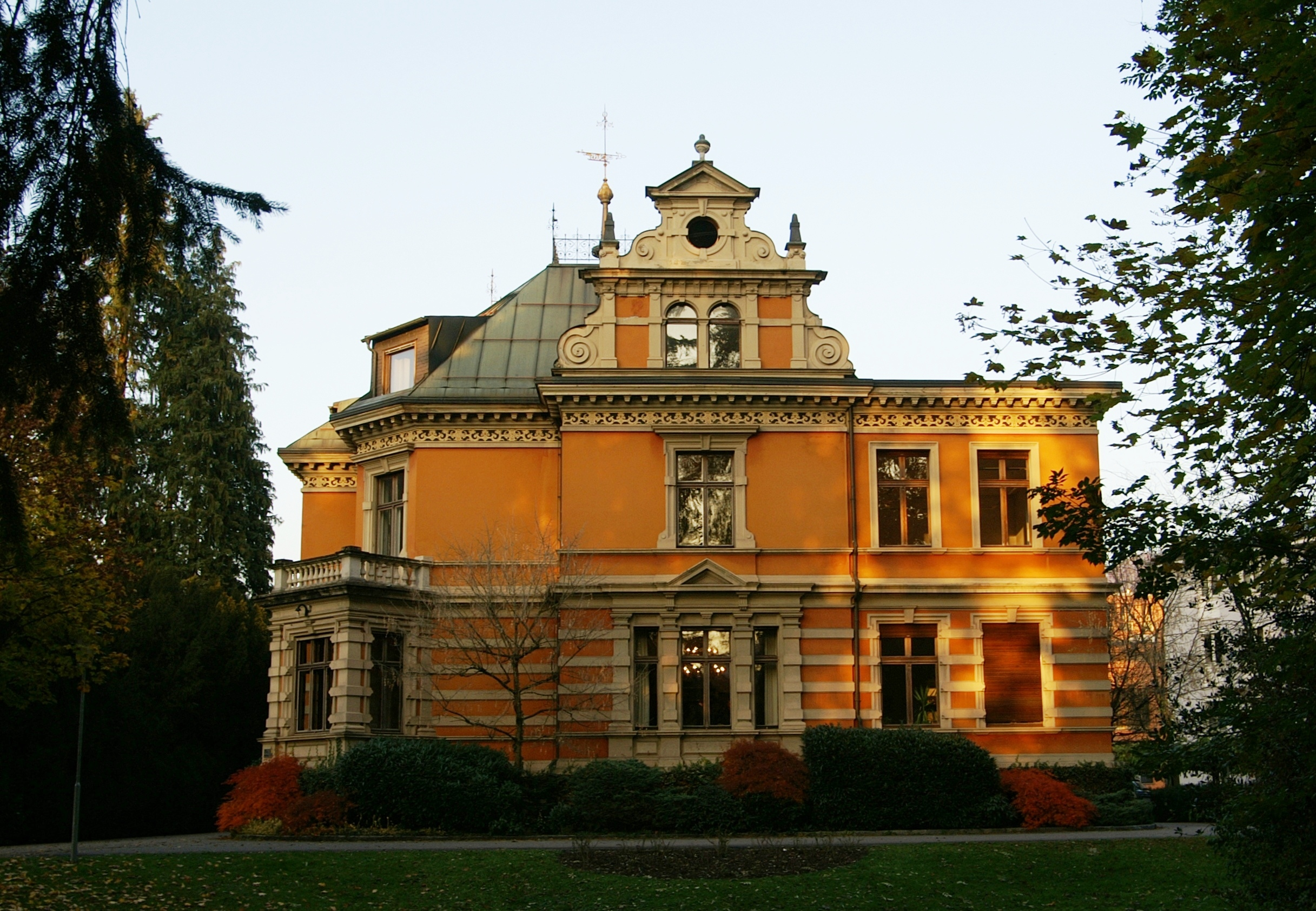 aus dem DEHIO Vorarlberg 1983: Villa Ganahl, Villa Claudia, (rote Villa), Bahnhofstrasse 6 in Feldkirch,Vorarlberg. Villa Claudia oder Villa Ganahl; erbaut 1884 von Schellenberg und Holzhammer. Reich gestalteter Baukörper auf asymmetrischem Grundriß in altdeutschen und barockisierenden Stilformen: mächtiger Turm mit Zwiebelhelm, reich gegliederte Fensterrahmungen im Hauptgeschoß, gemalter Fries in der Dachzone, altdeutscher Giebel, Firstgitter. Im Innern mehrere original erhaltene, reich ausgestattete Räume, eine Barockdecke aus dem 17. Jht. /// Bauherr: Arnold Ganahl / Architekten: Schellenberg und Holzhammer / Baufirma: Pümpel /// Arnold Ganahl (1837 – 1917) war von 1885 bis zur Jahrhundertwende Bürgermeister der Stadt Feldkirch, außerdem einige Jahre Landeshauptmannstellvertreter und von 1910 bis zu seinem Tod Präsident der Handelskammer. Den Namen erhielt die Villa nach Arnold Ganahls Mutter Claudia und nach seiner gleichnamigen Tochter. Der herrliche Planfond in der Ritterstube stammt aus dem Jonasschlösschen in Götzis.